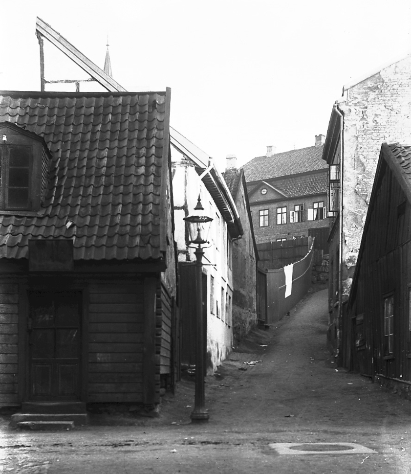 Berggata på Hammersborg mot Sorgenfri løkke. Foto: Johannes Holmsen (1908). Fra Byhistorisk samling hos Oslo Museum.